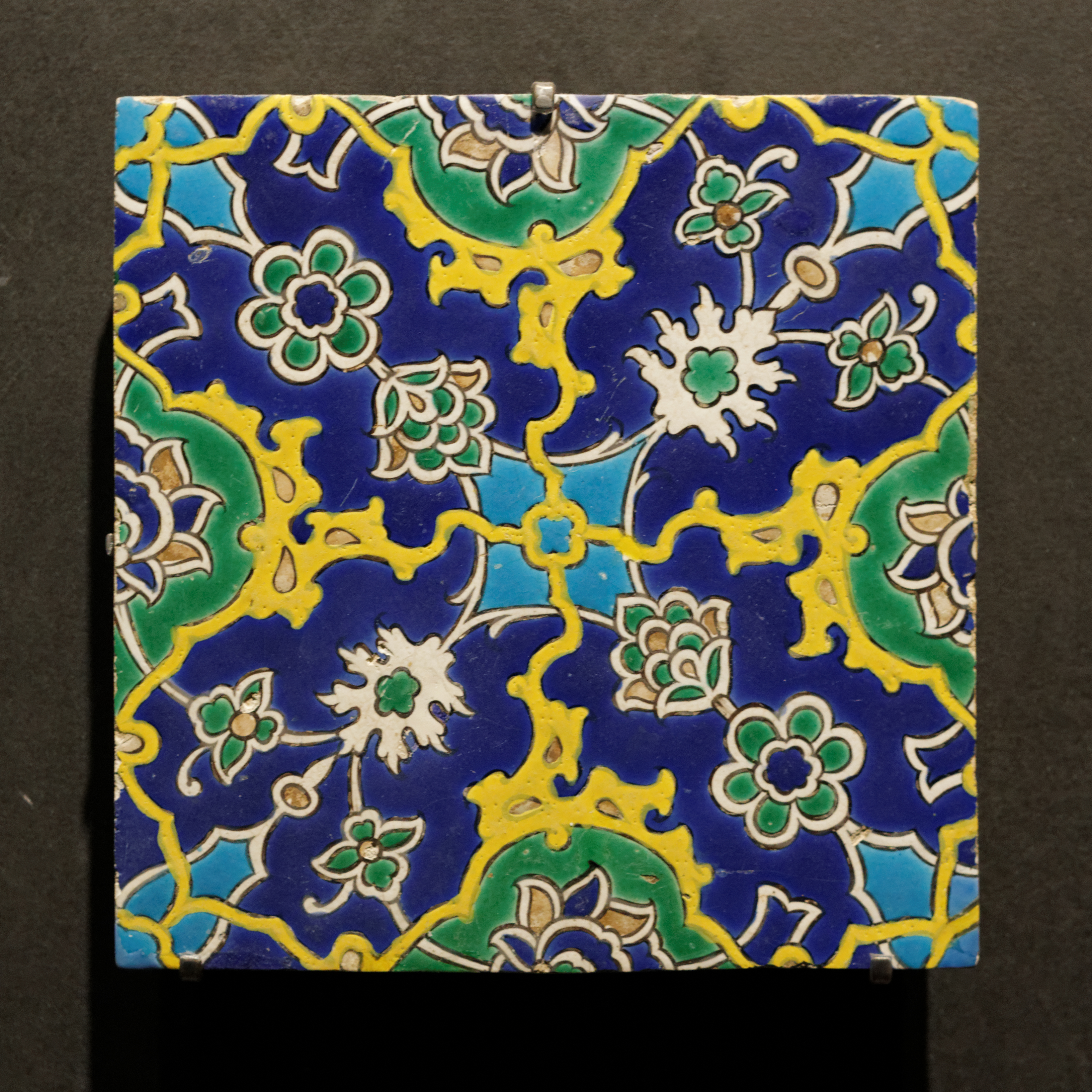 Carreaux de céramique ottomans. 16th century-19th century Musée du Louvre, Atlas database: entry 35830 Identical cuerda seca tiles decorate the facade of the throne room in the Topkapi Saray in Istanbul. They were probably made in Istanbul in the first half of the 16th century. See Porter, Venetia (1995). Islamic Tiles. London: British Museum Press. pp. 100-101 fig. 90. ISBN 978-0-7141-1456-9. Louvre Museum (Inventory)Native nameMusée du LouvreParent institutionÉtablissement public du musée du LouvreLocationParisCoordinates48° 51′ 37.42″ N, 2° 20′ 15.36″ E Established1793Web page control : Q19675 VIAF: 257711507 ISNI: 0000 0001 2260 177X ULAN: 500125189 LCCN: n80020283 NLA: 35912436 WorldCat Arts de l'Islam, room Espace B: L'Empire ottoman. Denon, Entresol. This work is part of the collections of the Louvre (Department of Islamic Art).